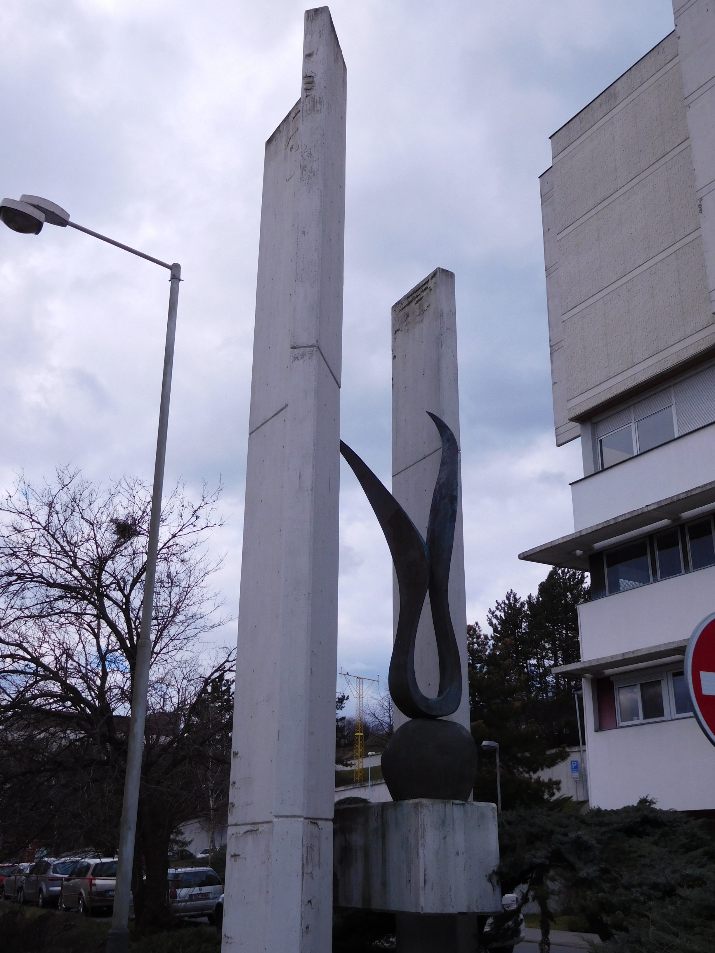 Praha - Libeň, Nemocnice Bulovka - plastika (Vincenc Vingler: Plamen života, 1978)